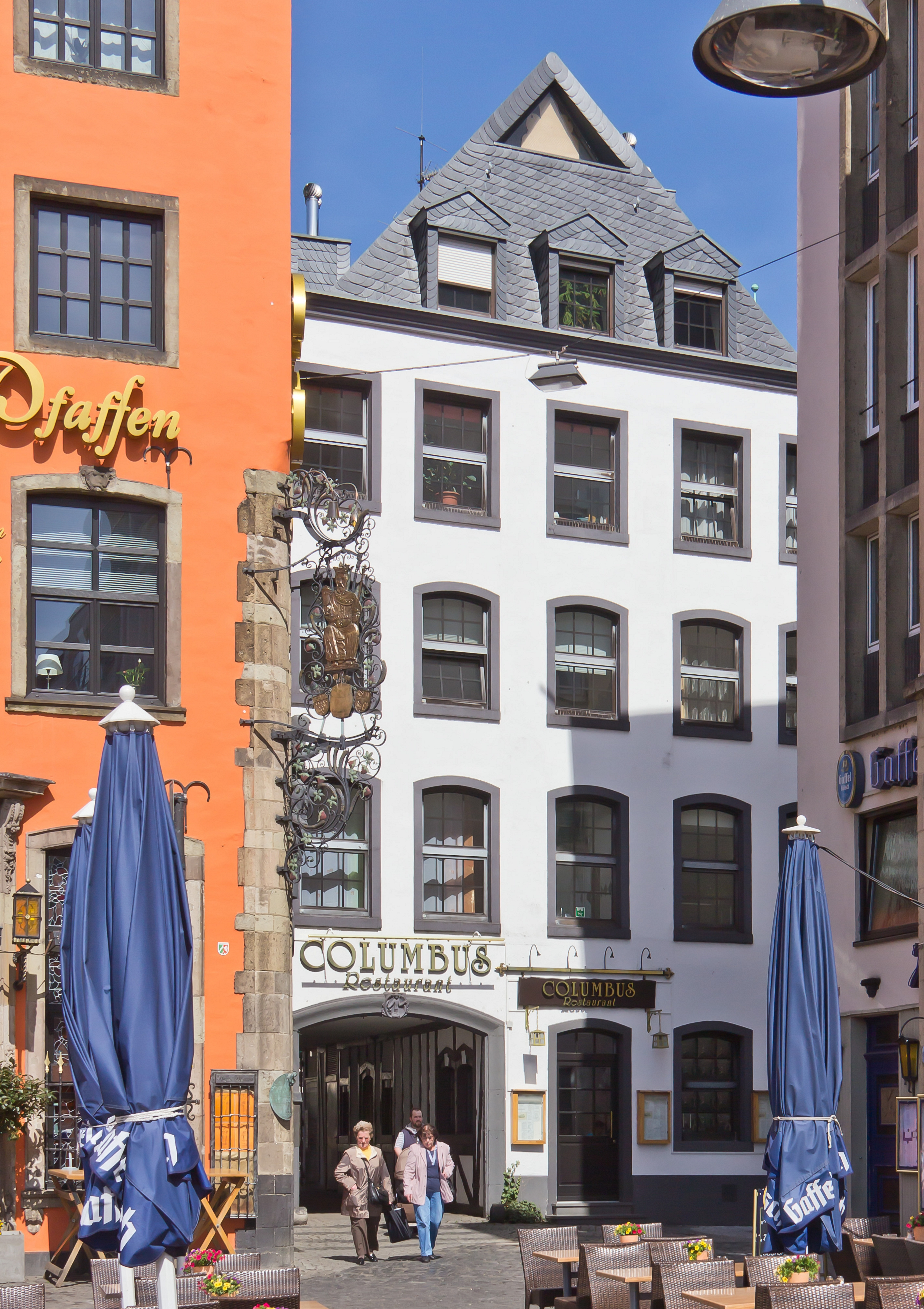 Wohn- und Geschäftshaus Heumarkt 60, Köln. Erbaut 1936, Architekt Karl Band